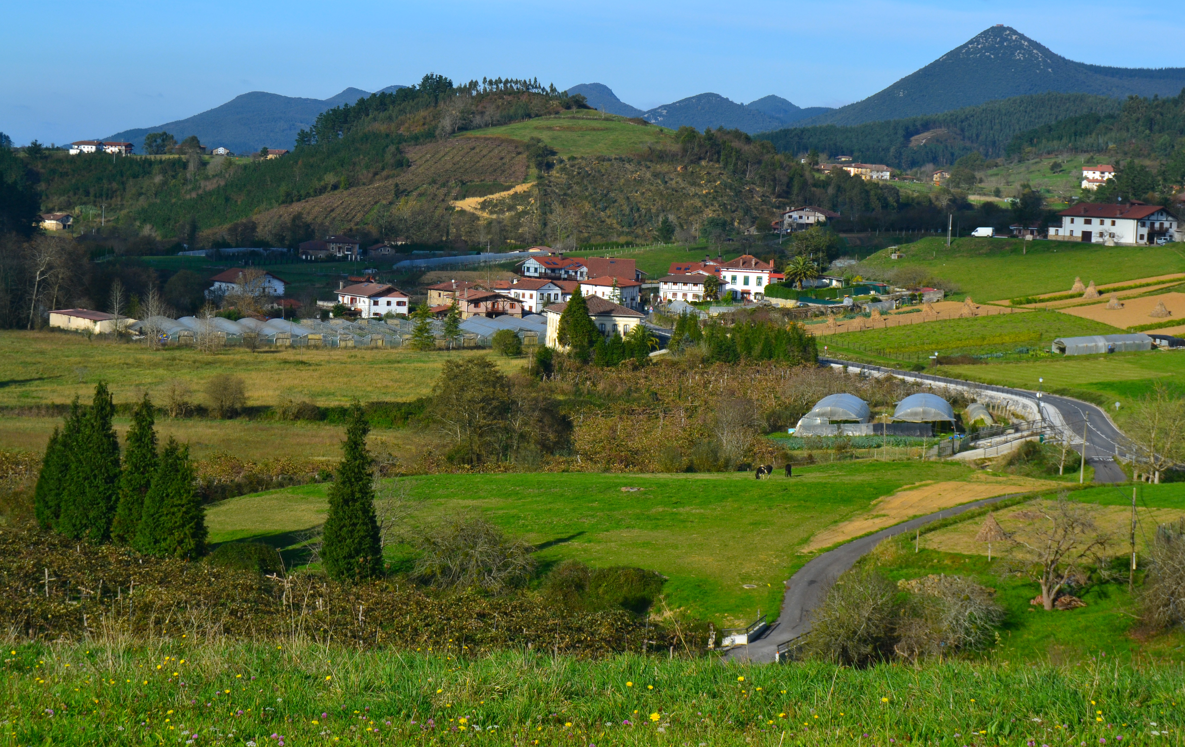 Arratzu. Bizkaia, Euskal Herria. Arratzu. Bizkaia, Basque Country.